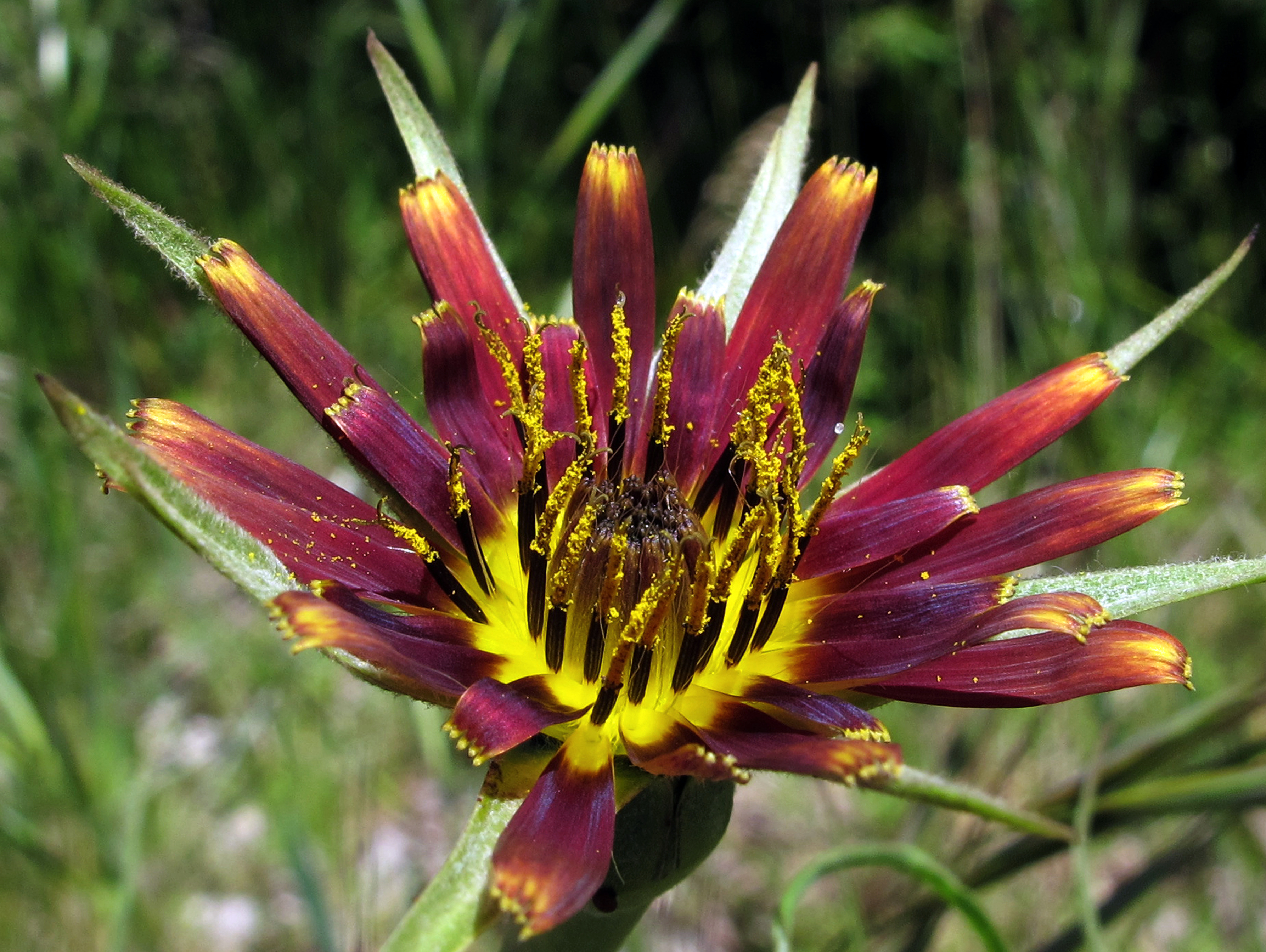 Tragopogon cracofolius (barbaja) - Capítulo en antesis. - localización desconocida (probablemente en España).